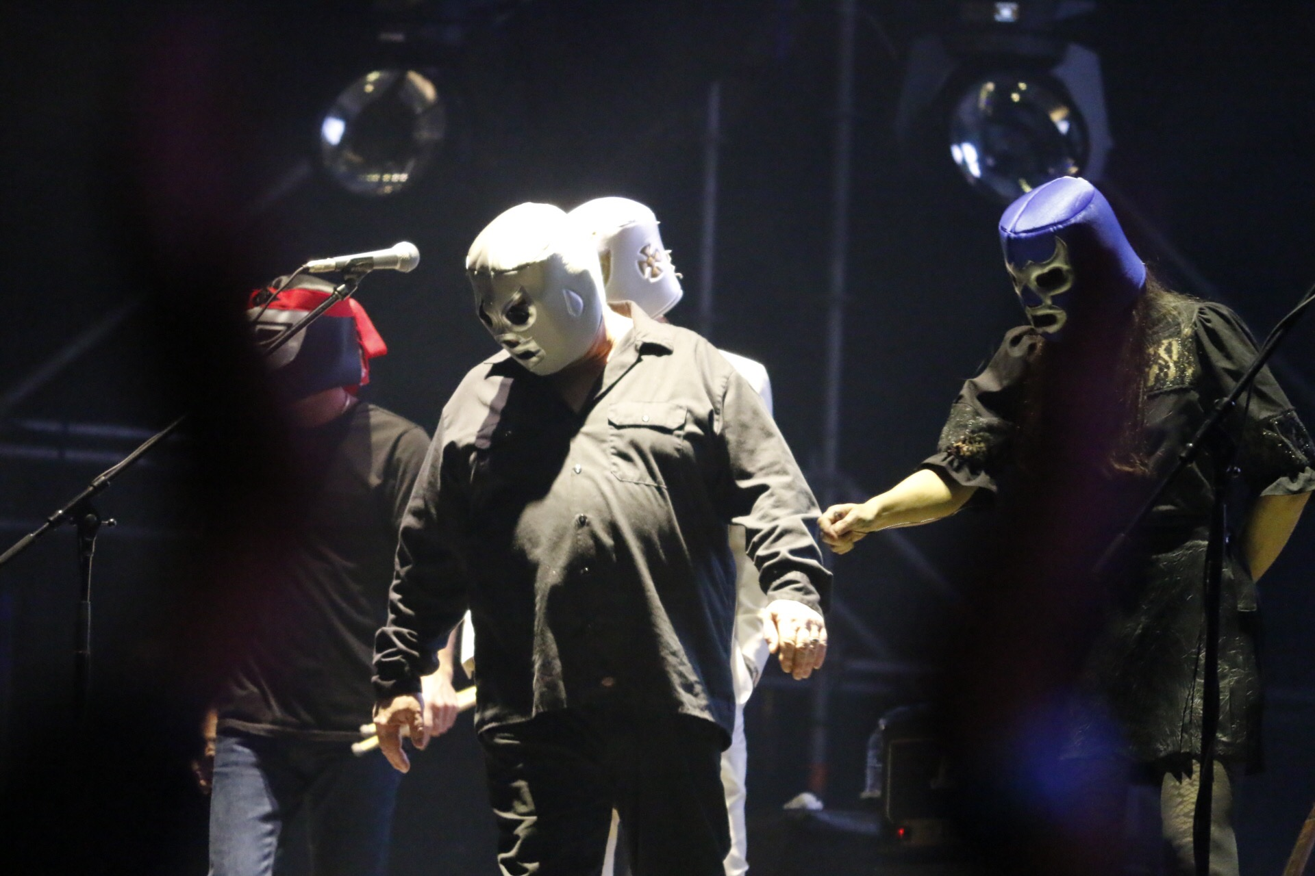 Sábado 10 de noviembre de 2018 Zócalo de la Ciudad de México, se llevó a cabo el segundo día de conciertos que forman parte de las actividades de la Semana de las Juventudes, dicho evento se realiza del 5 al 11 de noviembre con distintas sedes y más de 100 actividades, entre ellas el concierto masivo que convoco a grupos nacionales de música: Rey Pila, Comisario Pantera, Titan, DLD, asì como la banda internacional Pixies. Fotografía: Benjamín Anaya/ Secretaría de Cultura CDMX